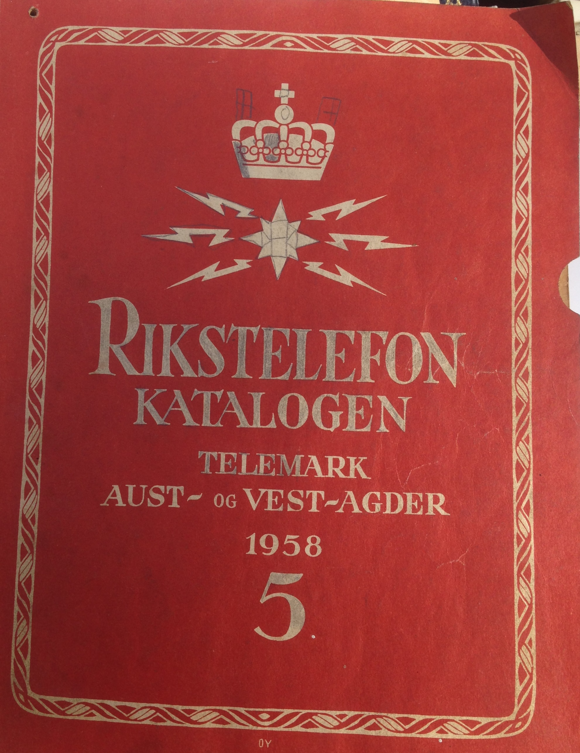 Telefonkatalog 1958